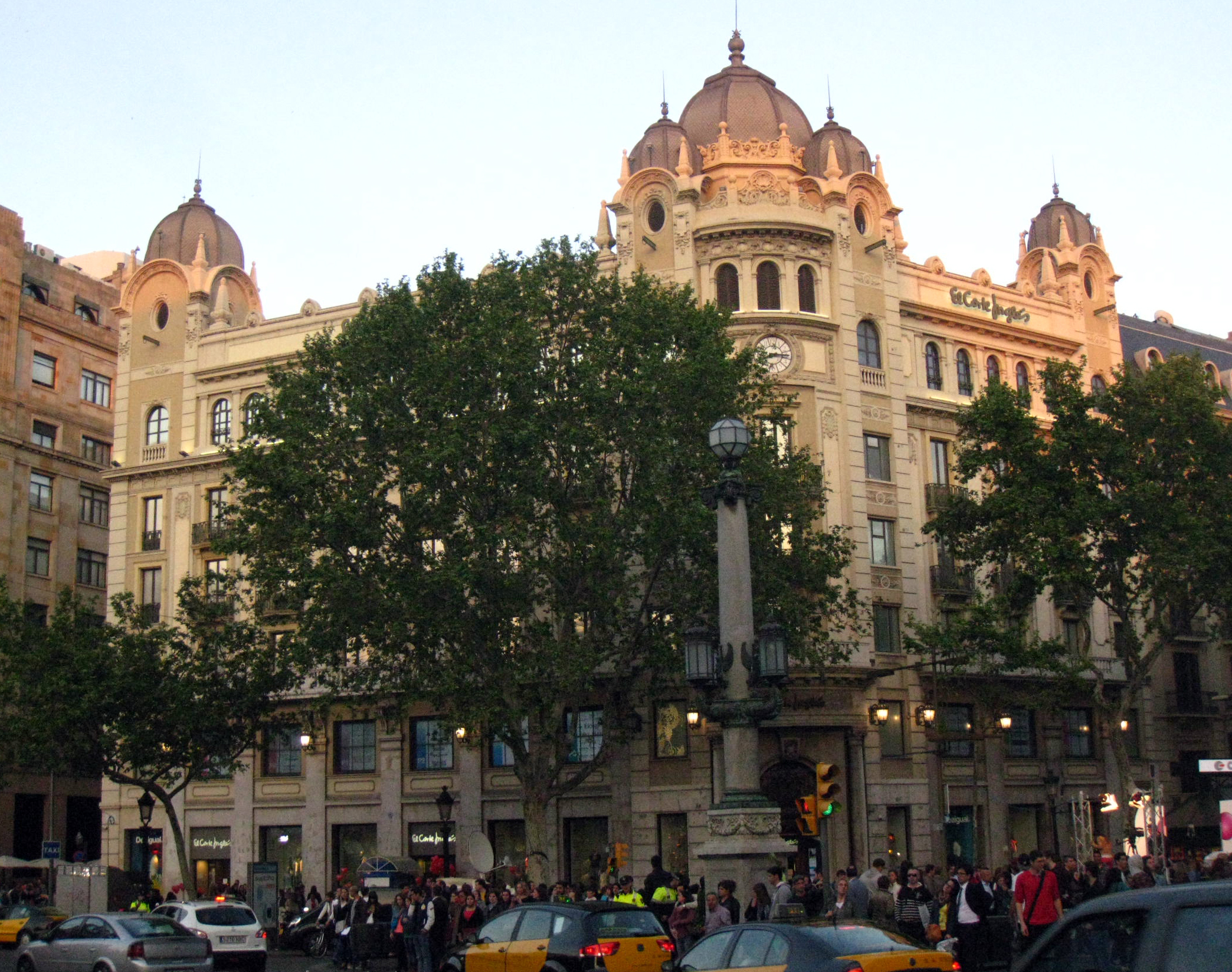 Antic Banc Central (Barcelona) Object location41° 23′ 08.19″ N, 2° 10′ 13.36″ E